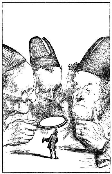 Imagens do Projeto Gutenberg Viagens de Gulliver para várias regiões remotas do mundo escrita por Jonathan Swift, d.d. e publicadas por Thomas M. Balliet com trinta e oito ilustrações e um mapa, ano 1900